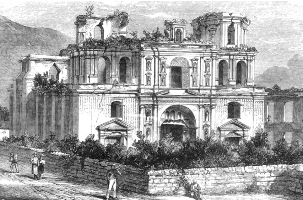 Iglesia de la Compania de Jesus después del terremoto de 1874.